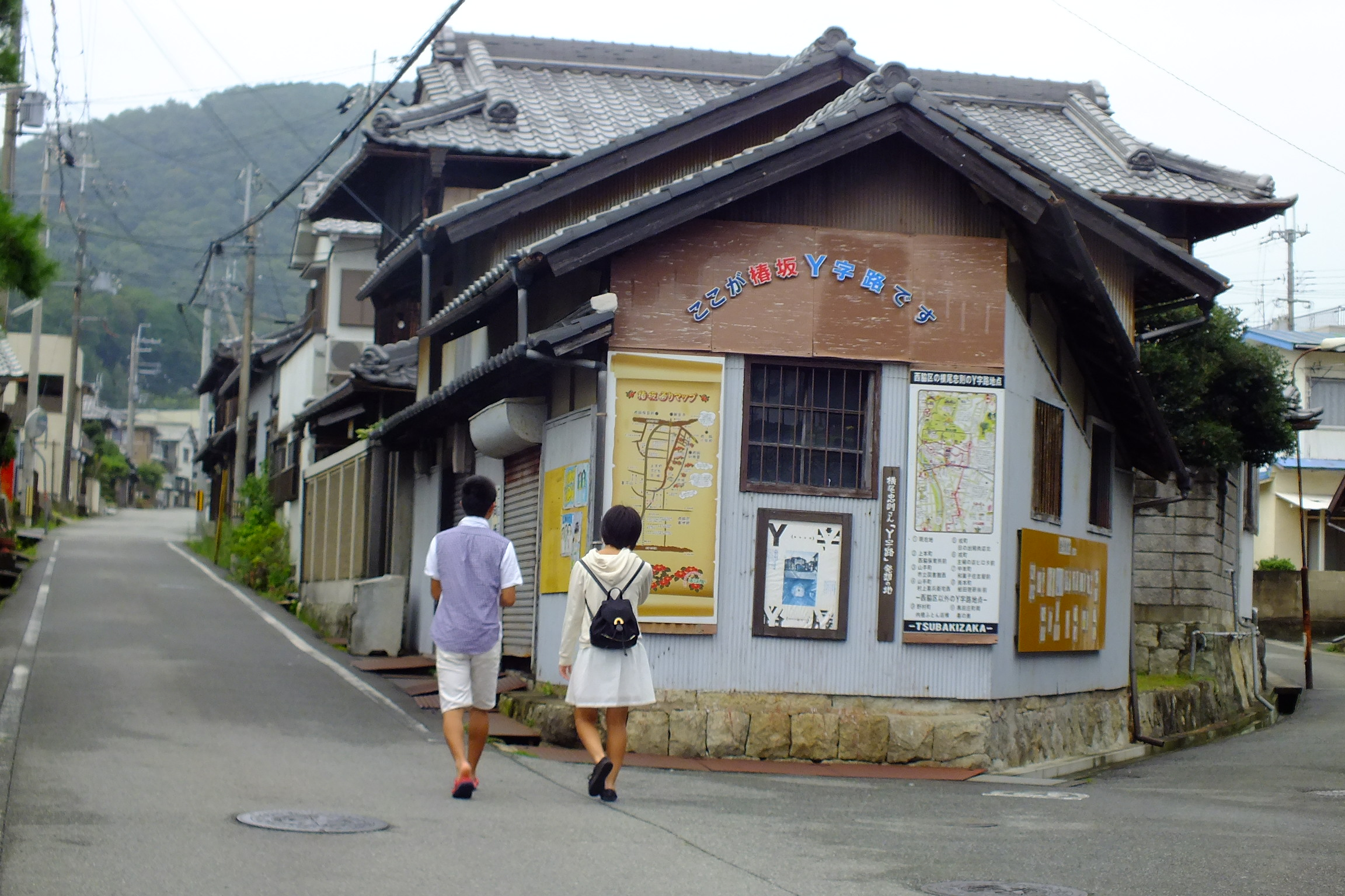 Y junctions in Nishiwaki,Hyogo,Japan 椿坂、西脇yY字路 横尾忠則 - 暗夜光路N市-1